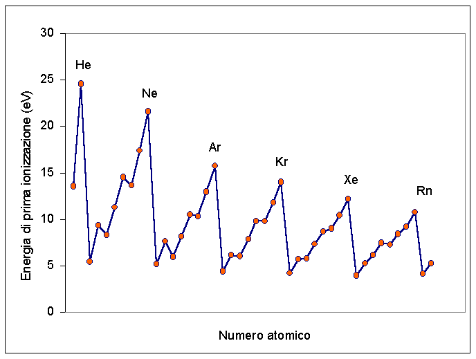 L'immagine rappresenta l'energia di prima ionizzazione per gli elementi dei blocchi principali in funzione del numero atomico. E' copyfree perchÃ© costruita con Excel in base a dati reperibili in letteratura